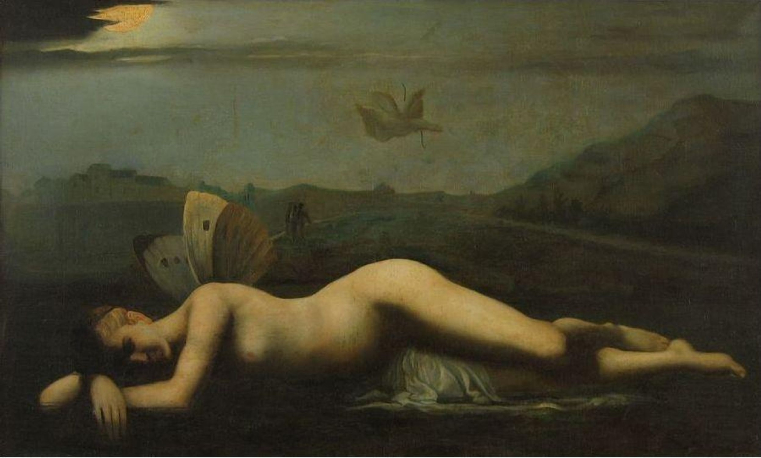 Sava Henţia (1848 - 1904) - Psyche părăsită de amor, nesemnat, ulei pe pânză, 96.5x163.5cm, lucrarea figurează în monografia Sava Henţia de Mircea Popescu, reprodusă la pag.12, restaurată. Muzeul Brukenthal din Sibiu. O replică a ei se găsește și la Muzeul de Artă din Târgoviște.